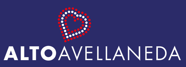 Logo del Alto Avellaneda Shopping Mall.